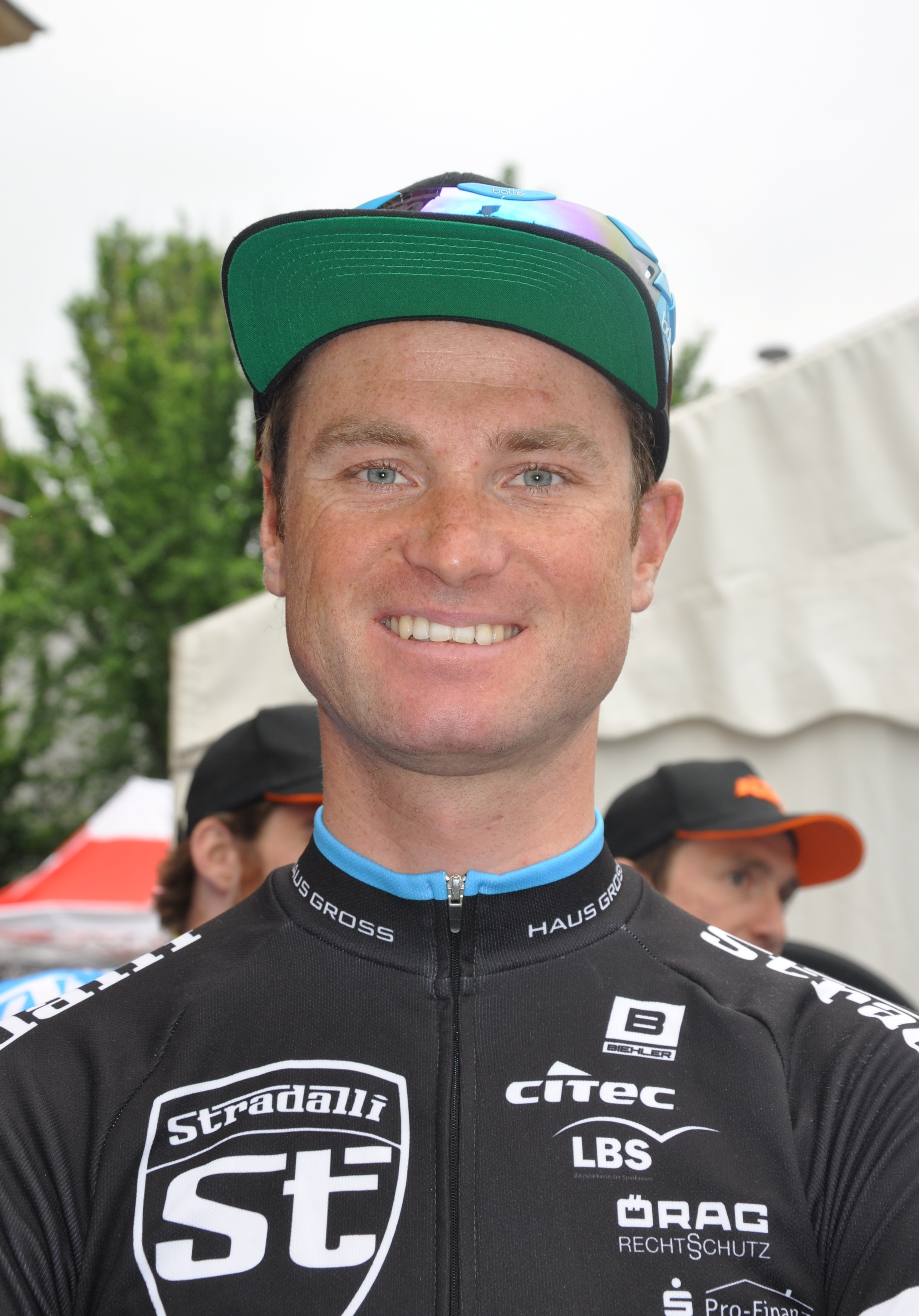 Daniel Bichlmann, deutscher Radrennfahrer